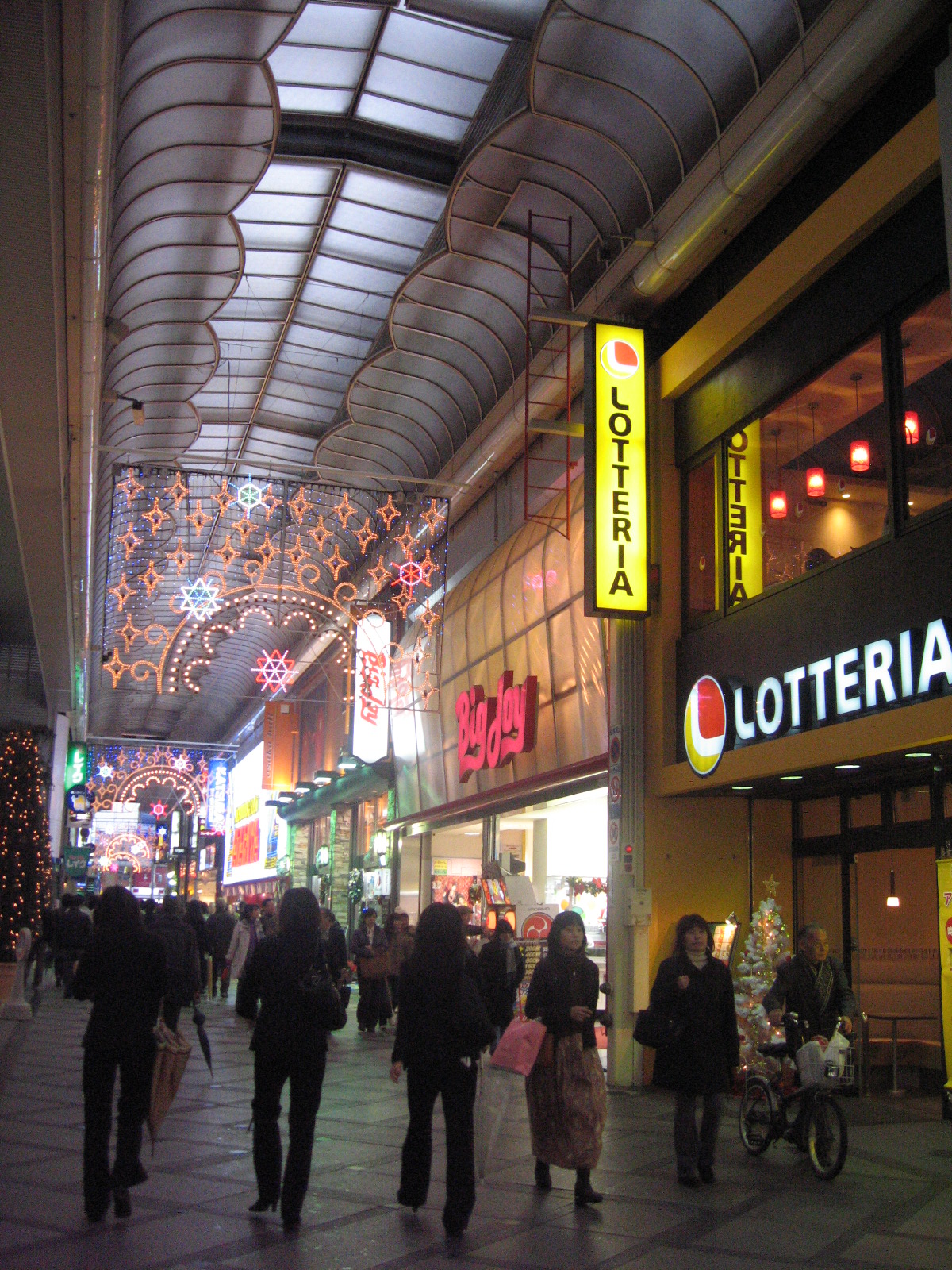 Shinsaibashi, Osaka, Kansai Region.